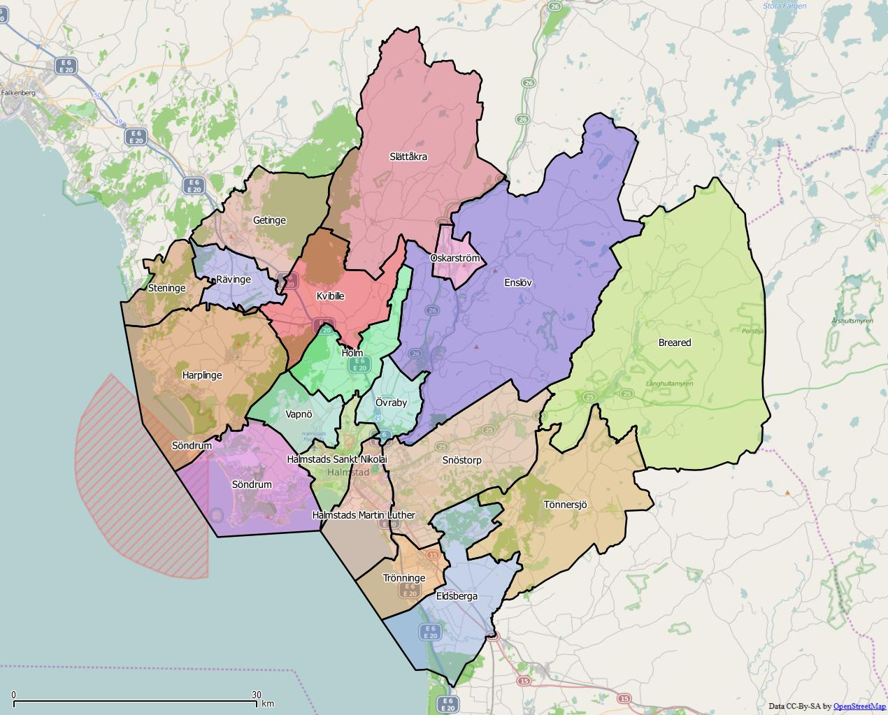 Distriktsindelningen i Halmstads kommun